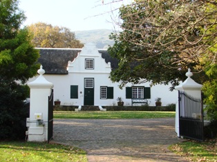 Weingut La Motte, Franschhoek, Südafrika This media shows a South African Protected Site with SAHRA file reference 9/2/069/0077.